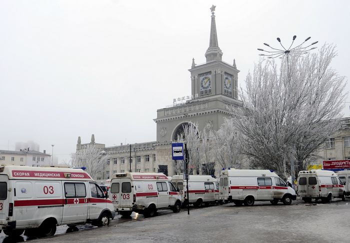 Attentats de décembre 2013 à Volgograd, attentat-suicide dans la gare de Volgograd.